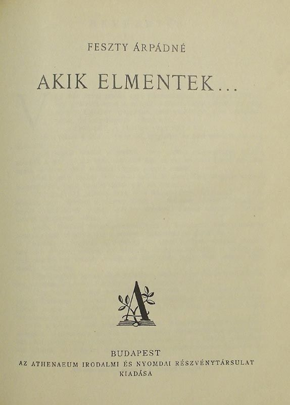 Feszty Árpádné (Jókai Róza) Akik elmentek... című művének (Budapest, 1923) címlapja Róza Jókai (1861–1936) Alternative namesMrs. Árpád FesztyDescription Hungarian writer and painter Date of birth/death19 February 186128 February 1936Location of birth/deathPest (Budapest)Budapest